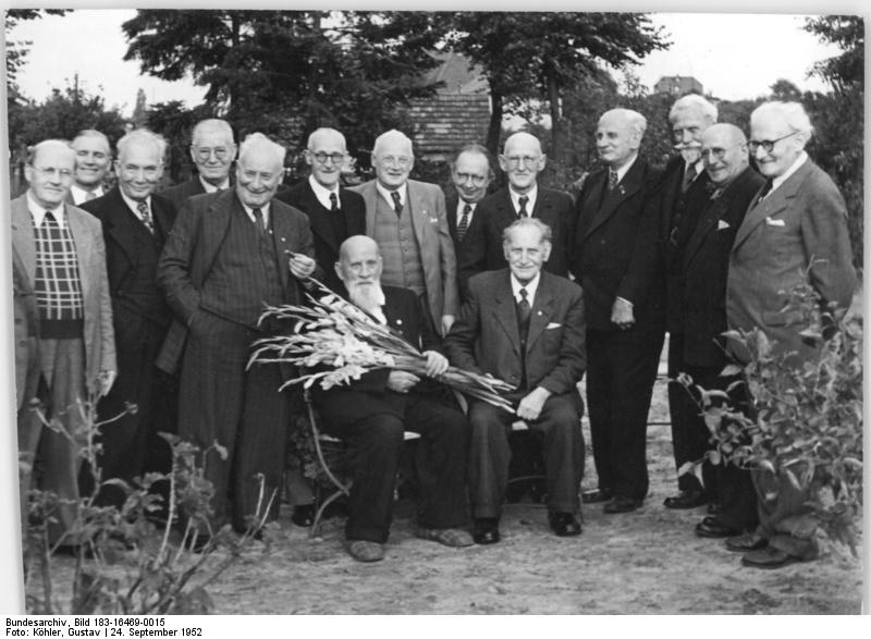 Zentralbild Köhler 24.9.1952. Veteranen der Arbeiterbewegung. 1119 Lebensjahre, 836 Jahre Tätigkeit in der Arbeiterbewegung. von links nach rechts: Adolf Linke ( 75 J.) Karl Litke (59 J.) Richard Rauprecht (68 J.) Hermann SChlimme (70 J.) Helmut Lehmann (69 J.) Otto Bucke (73 J.) Max Wieth (73 J.) Otto Richter (75 J.) Karl Schubert (80 J.) Josef Mühlmann (70 J.) Max Sassen (73 J.) Wilhelm Peters (73 J.) Emil Bittner (79 J.) sitzend: Eugen Ernst (links) (68 J.) und Otto Büchner (87 J.)